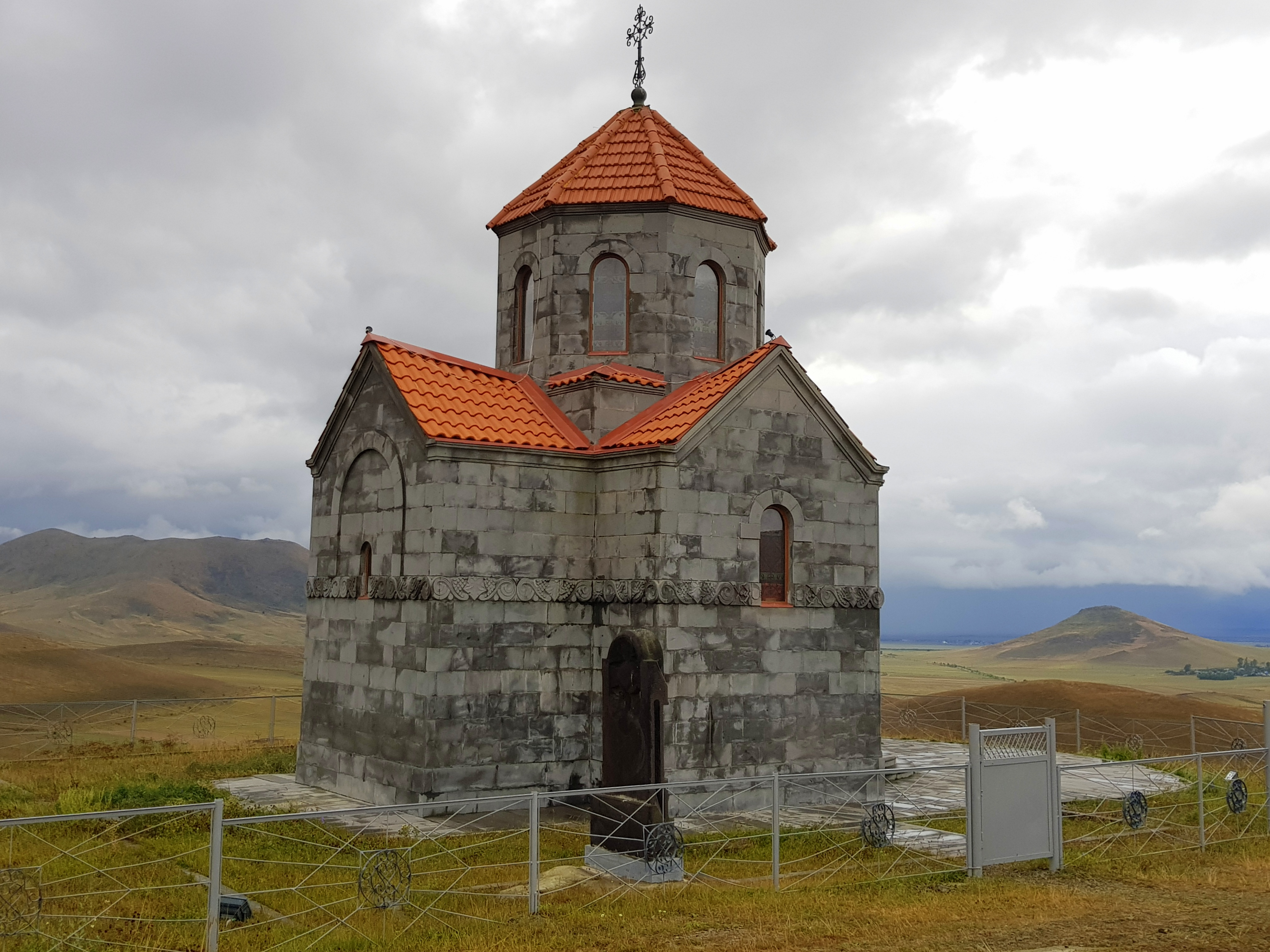 «Կարճադոշ» բնակատեղիի Սուրբ Սարգիս եկեղեցի, Լեռնահովիտ 39/2